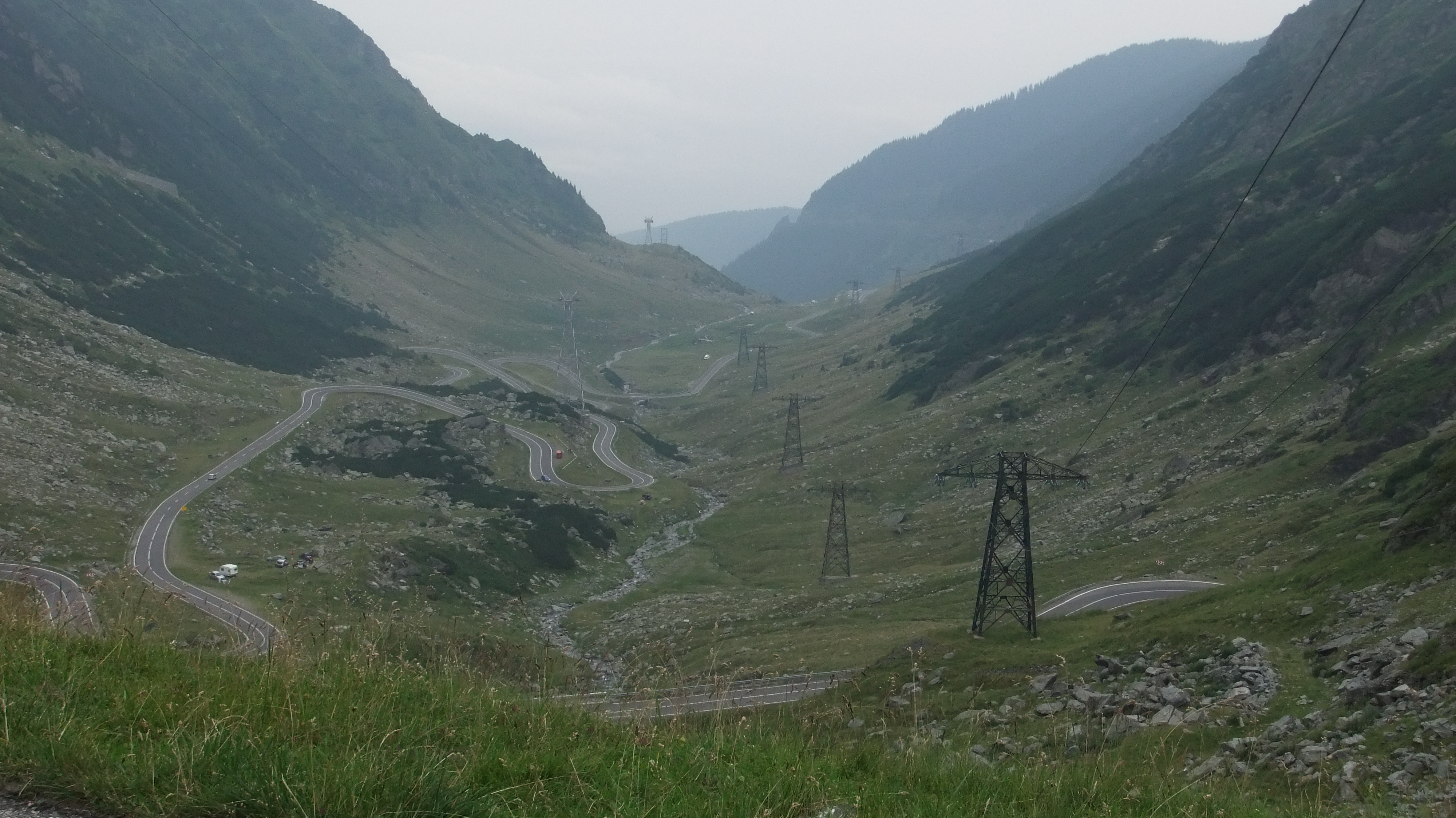 Arefu, Romania